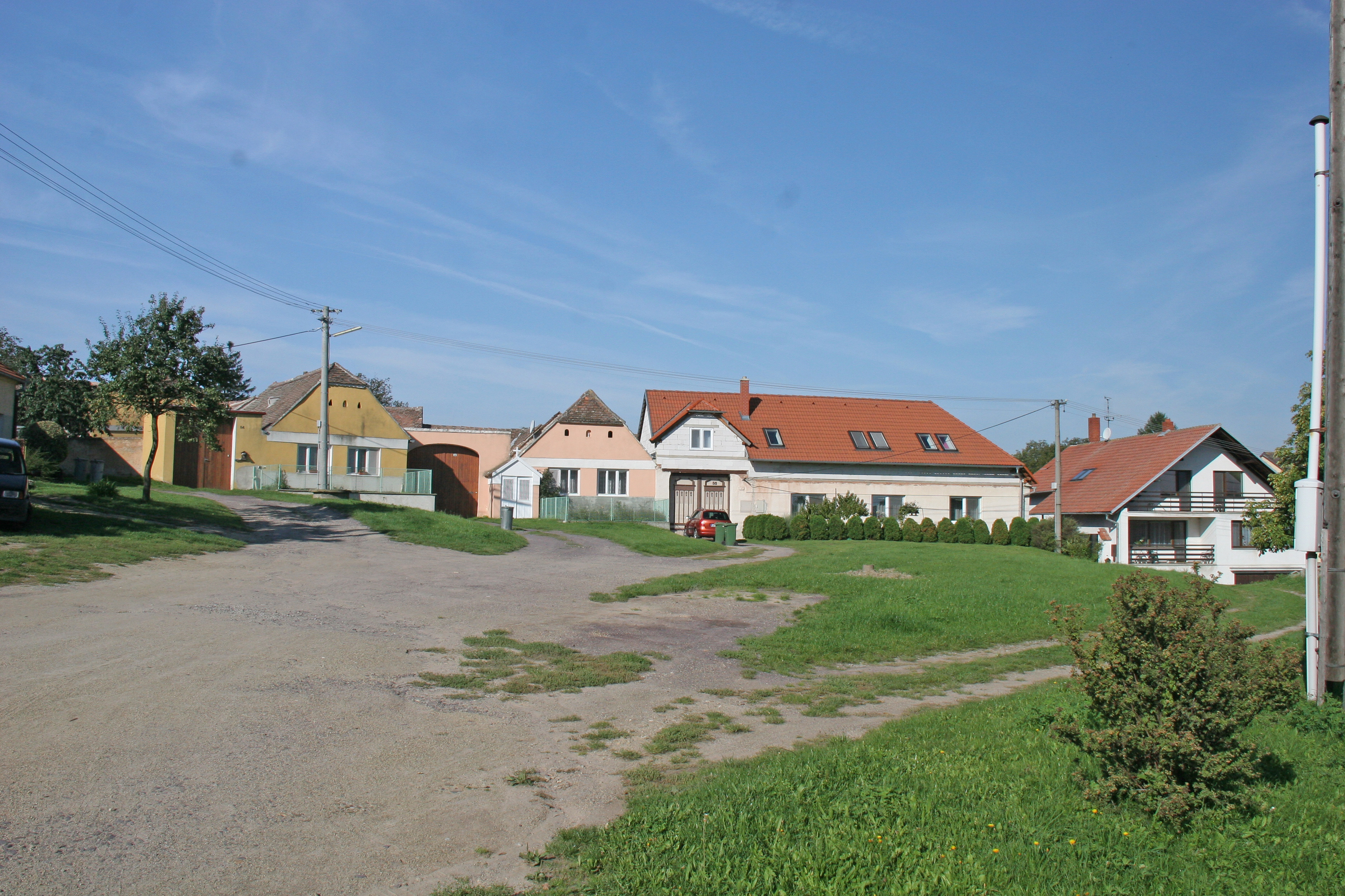 Mašovice čp. 35